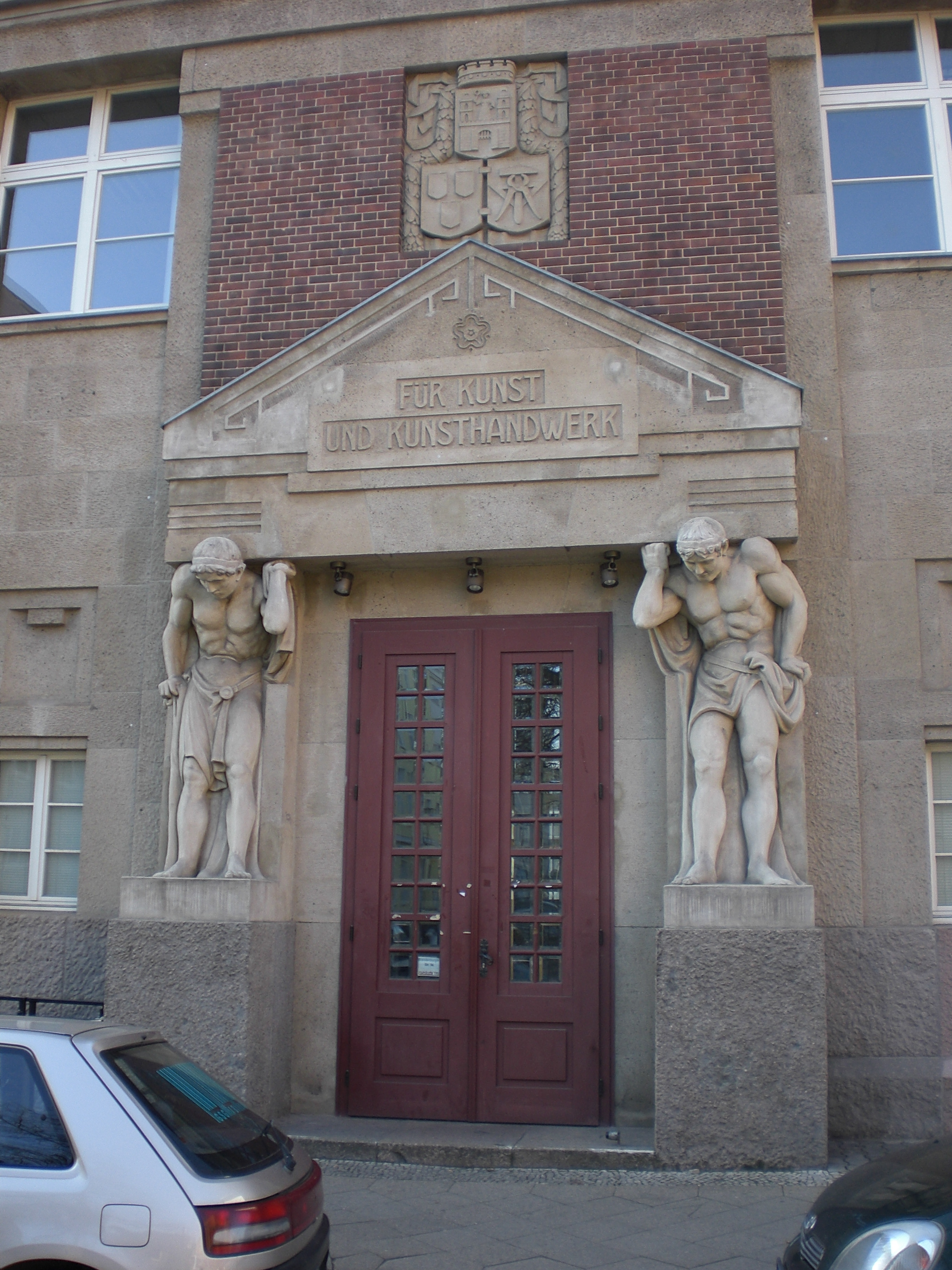 Gebäude der ehemaligen Kunstgewerbe- und Handwerkerschule Magdeburg